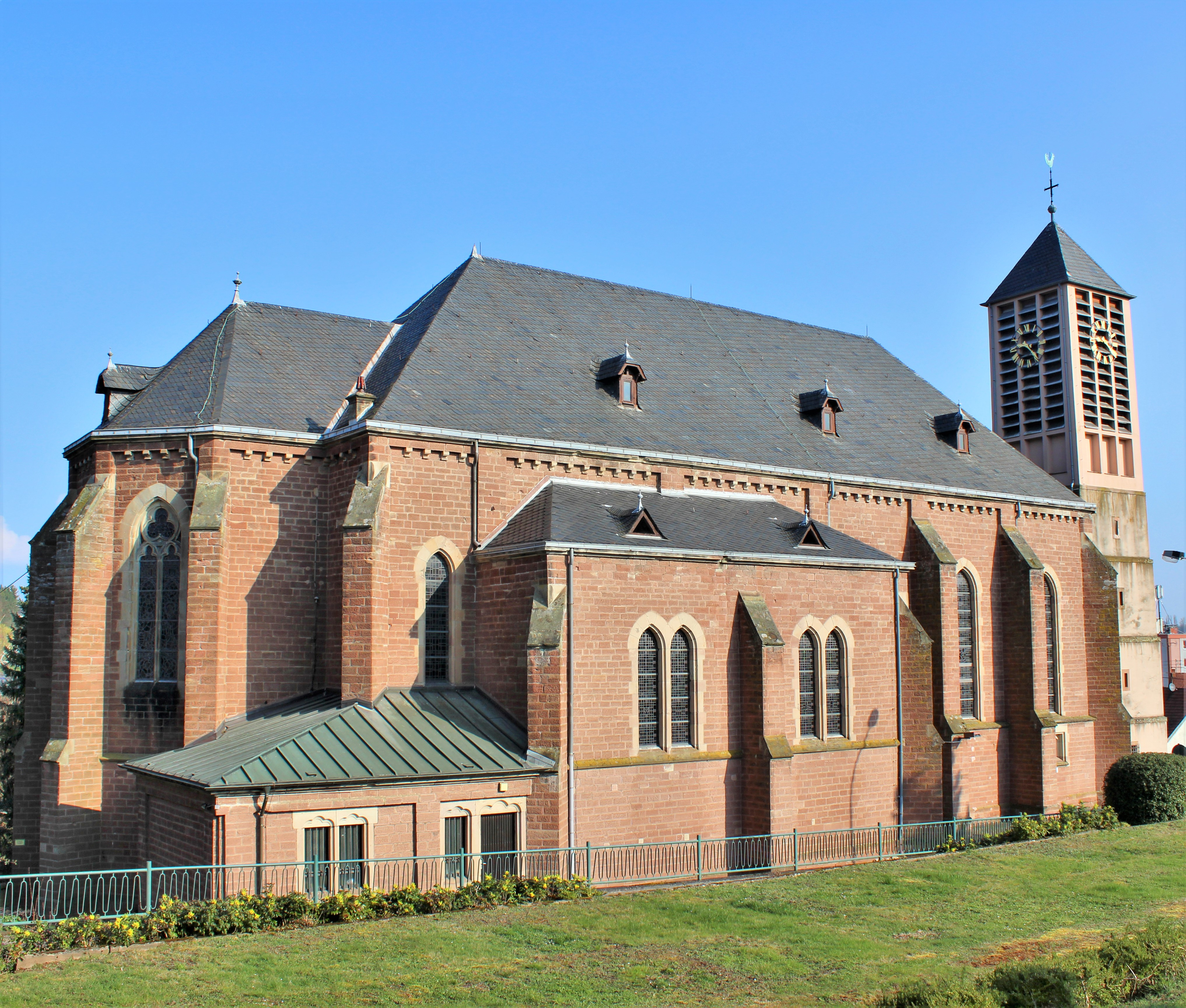 Die katholische Pfarrkirche St. Leodegar in Düppenweiler, einem Ortsteil der Gemeinde Beckingen, Landkreis Merzig-Wadern, Saarland